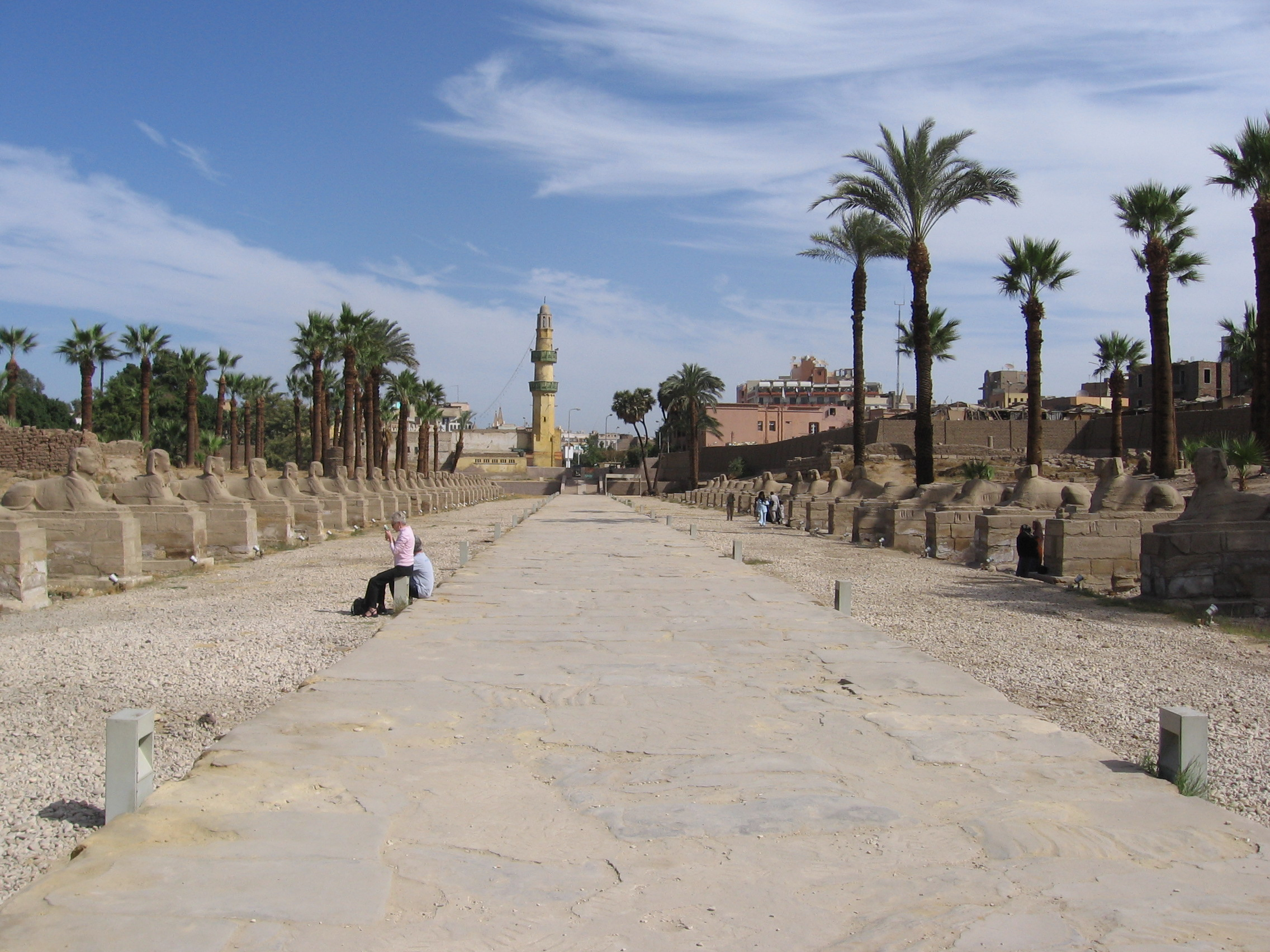 Gången mellan Luxortemplet och Karnak. Precis utanfö Luxortemplet.